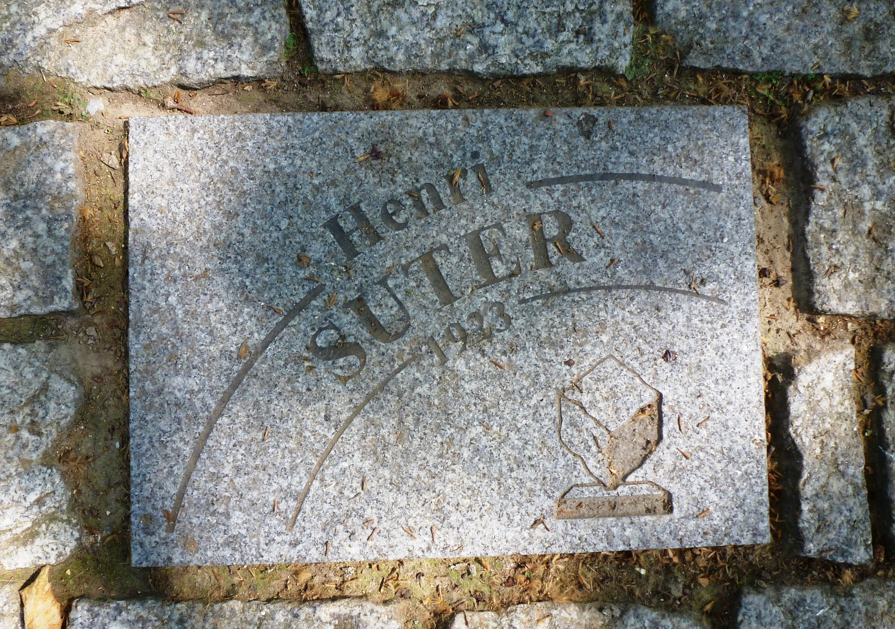 Pflasterstein für Heiri Suter auf der Allée Charles Crupelandt in Roubaix